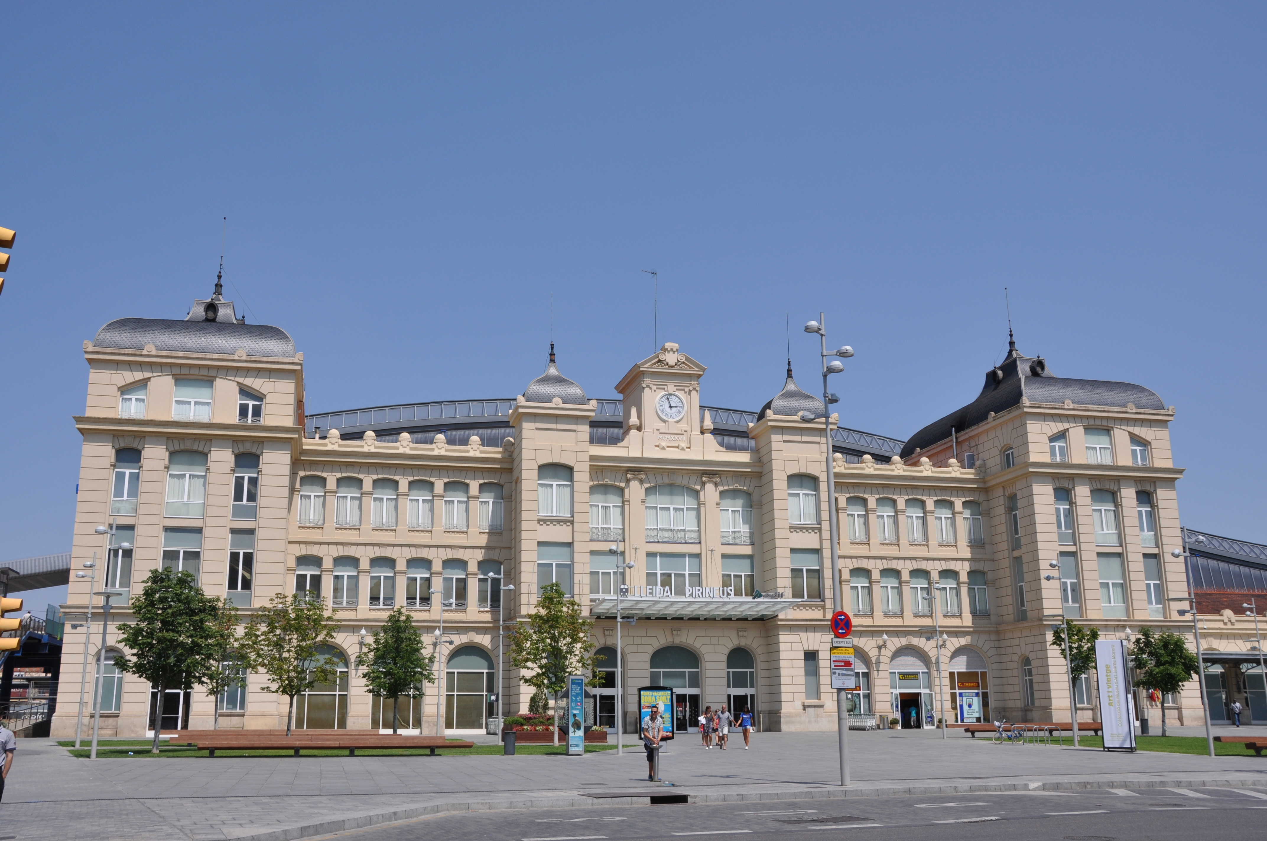 Lleida, estació de tren, d'Adolf Florensa (1927)